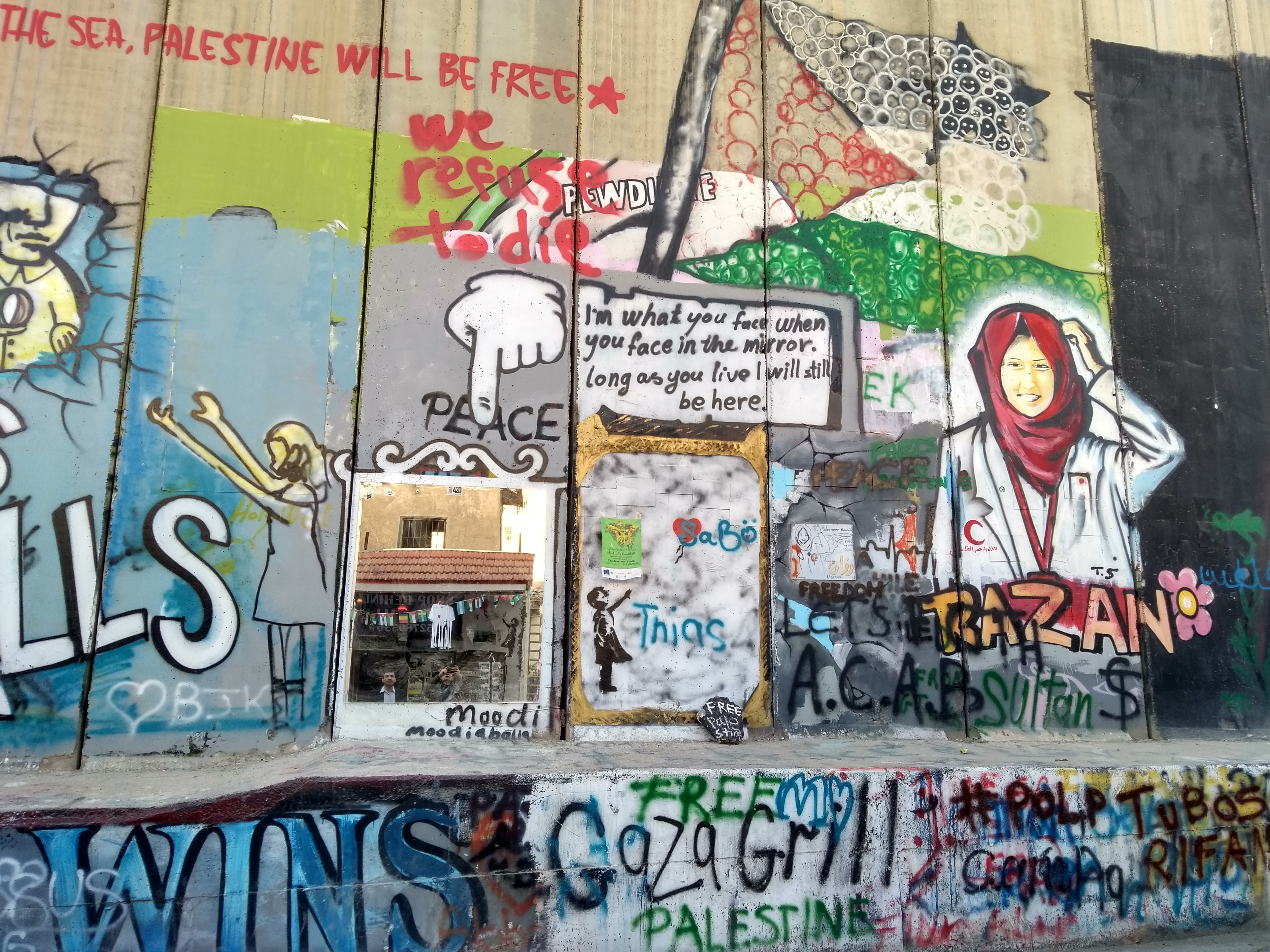 IMG_20190410_175935943_HDR